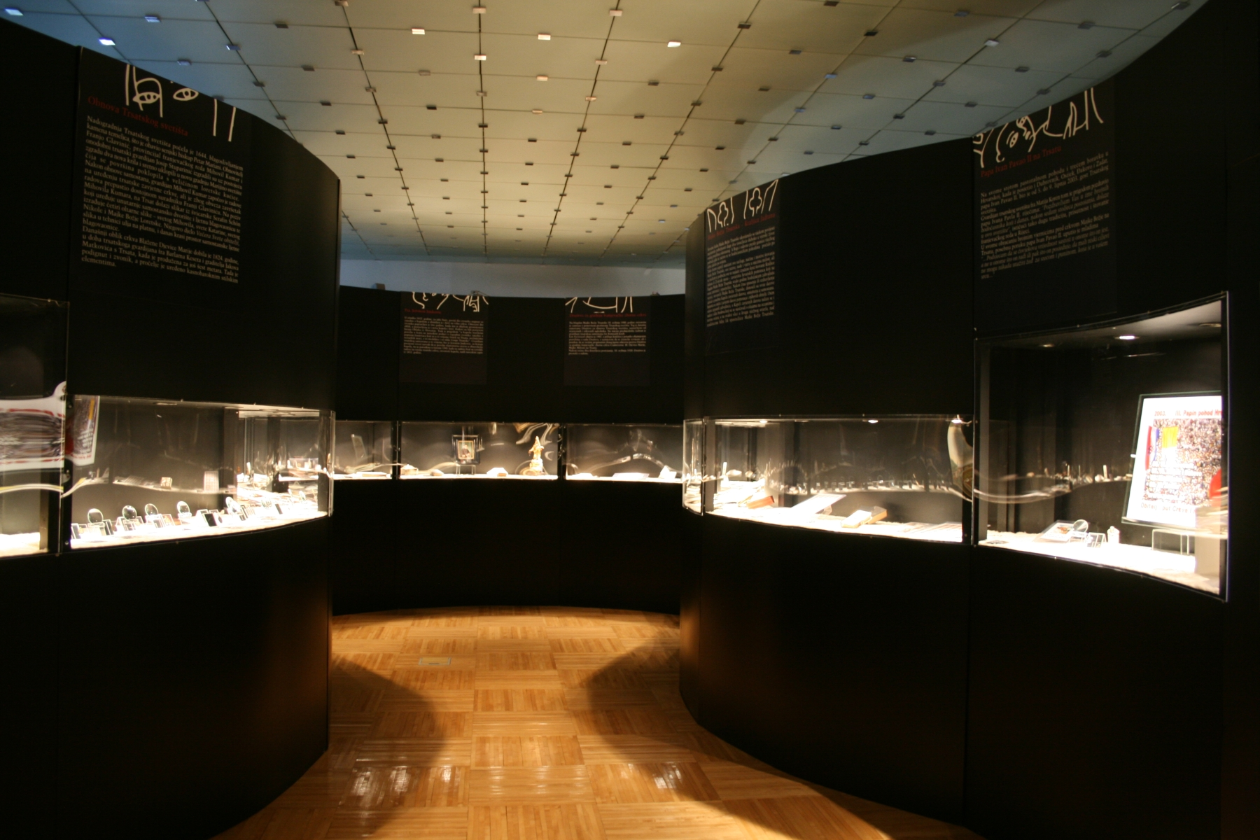 Trsatsko svetište u muzeju grada Rijeke